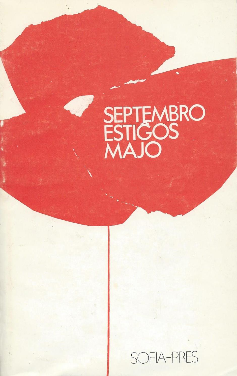 Librokovrilo de "Septembro estiĝos majo", 1983.